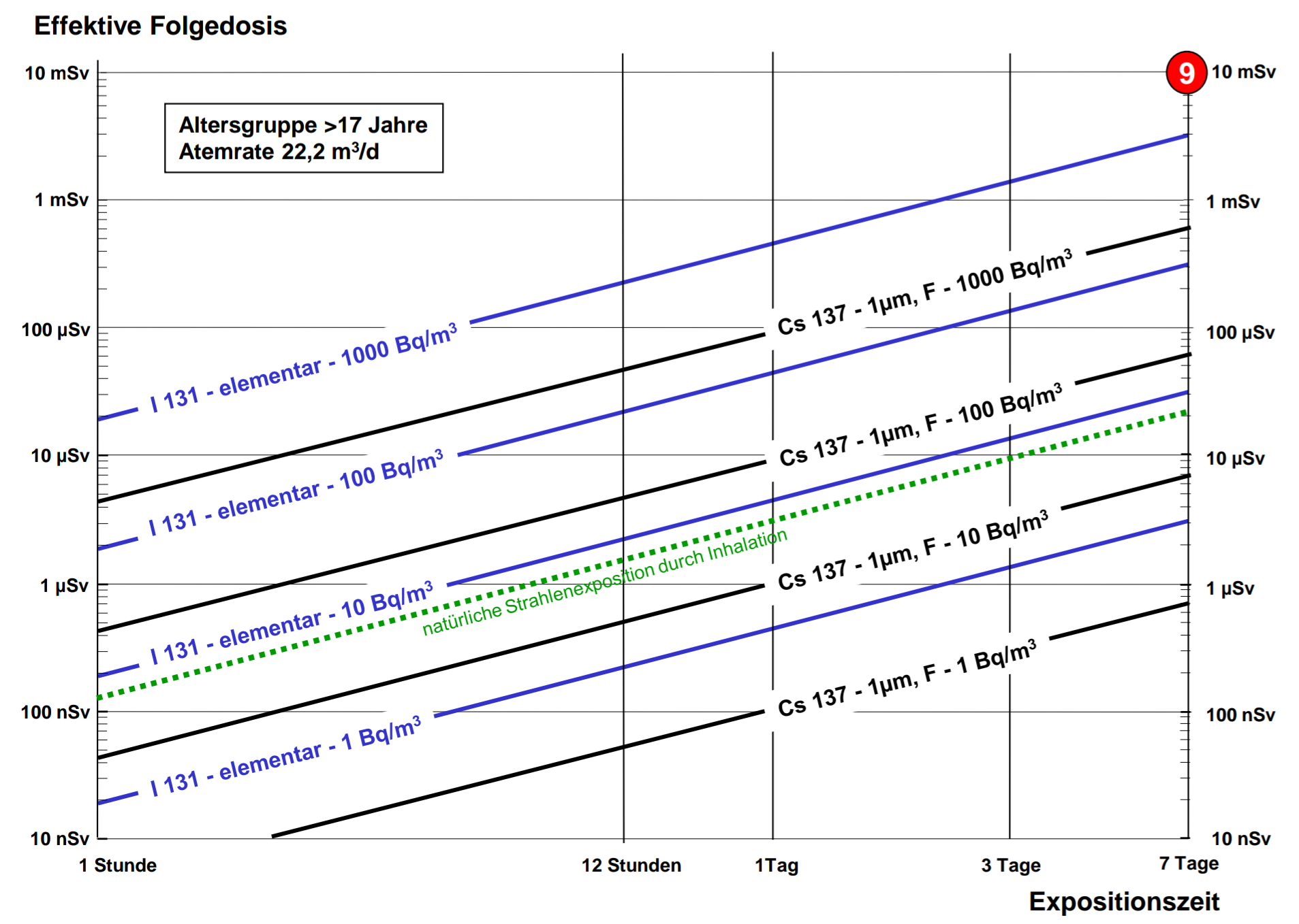 Dosisaufnahme (effektive Folgedosis) durch Inhalation von aerosolgebundenem Cs-137 und elementarem I-131 bei bekannter Aktivitätskonzentration in der Luft